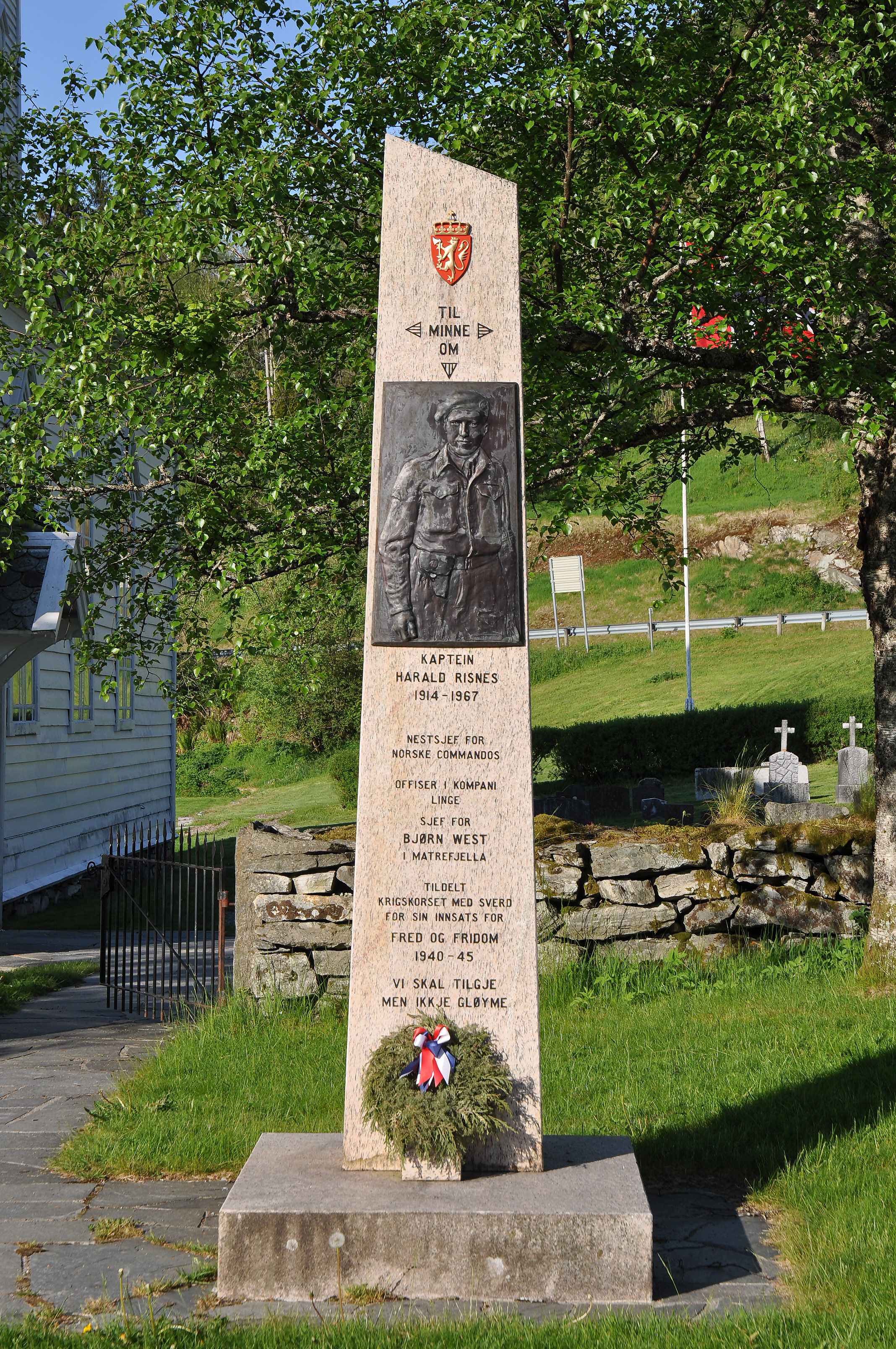 Krigsminnesmerket ved Hyllestad kyrkje. På dette obelisk-forma minnesmerket står namna på personar frå Hyllestad kommune som på ulikt vis kjempa mot den tyske okkupasjonen av Norge under 2. verdskrigen: kaptein Harald Risnes, offiser i Kompani Linge og leiar for norske kommandosoldatar i Matrefjella 1944-45, dei som blei mobiliserte til innsats for Hæren og sjøfolk i utanriksfart og i Marinen.